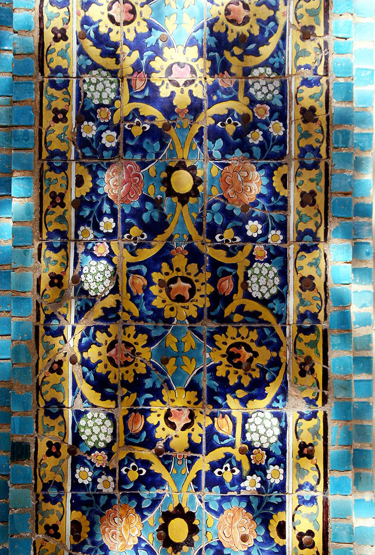 Dar al Ehsan MQ sanandaj 2